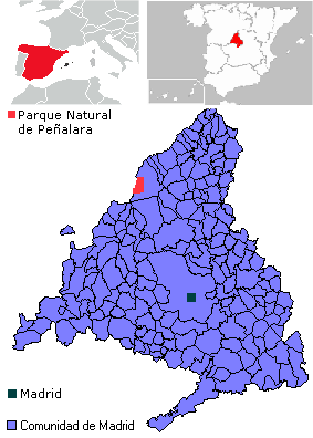 Mapa del Parque Natural de Peñalara.